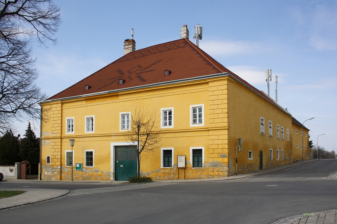 Das Gebäude der ehemaligen Esterhazyschen Gutsverwaltung in der burgenländischen Marktgemeinde Hornstein.